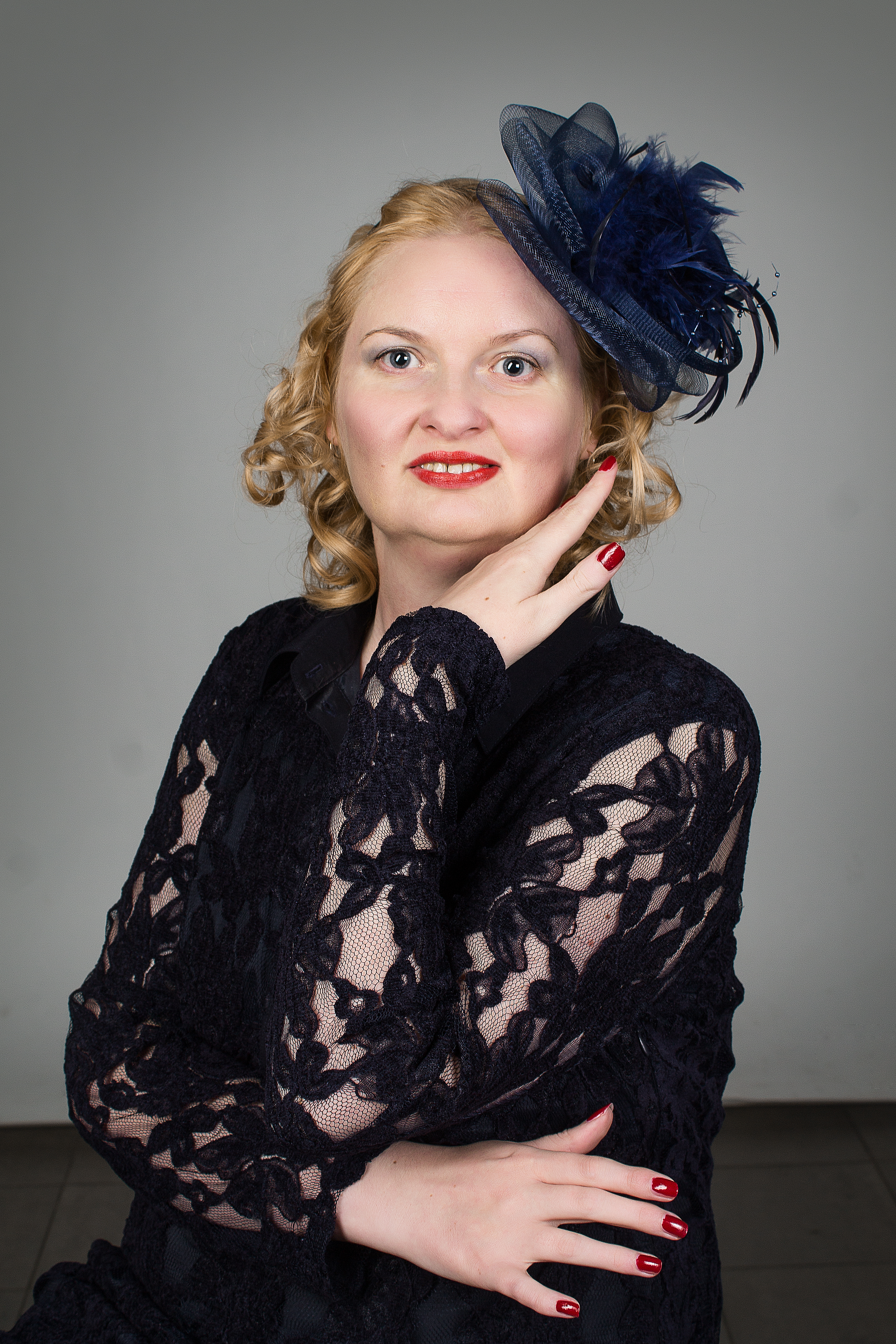 Tiina Kilkson